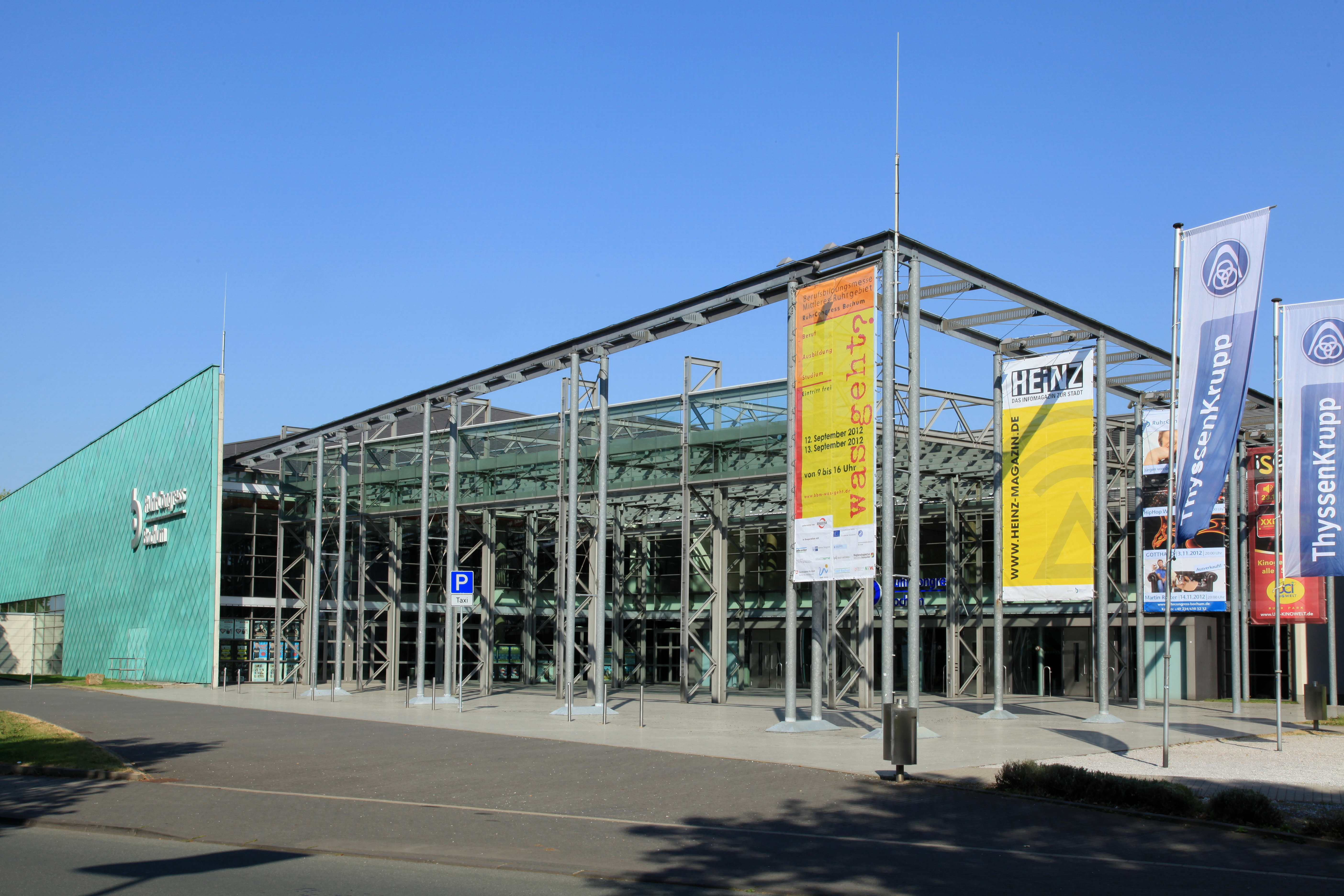 RuhrCongress, Stadionring 20 in Bochum